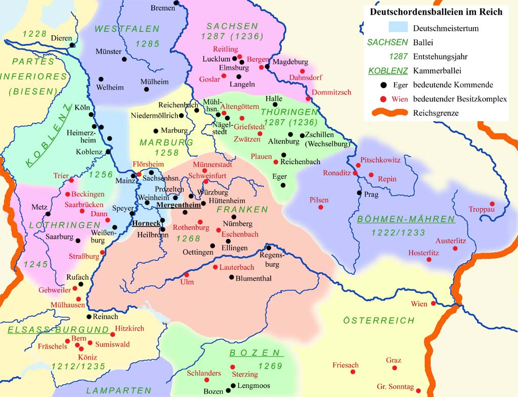 Deutscher Orden Niederlassungen und Balleien im Heiligen Römischen Reich 14.Jh.